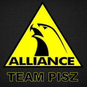 Logo klubu